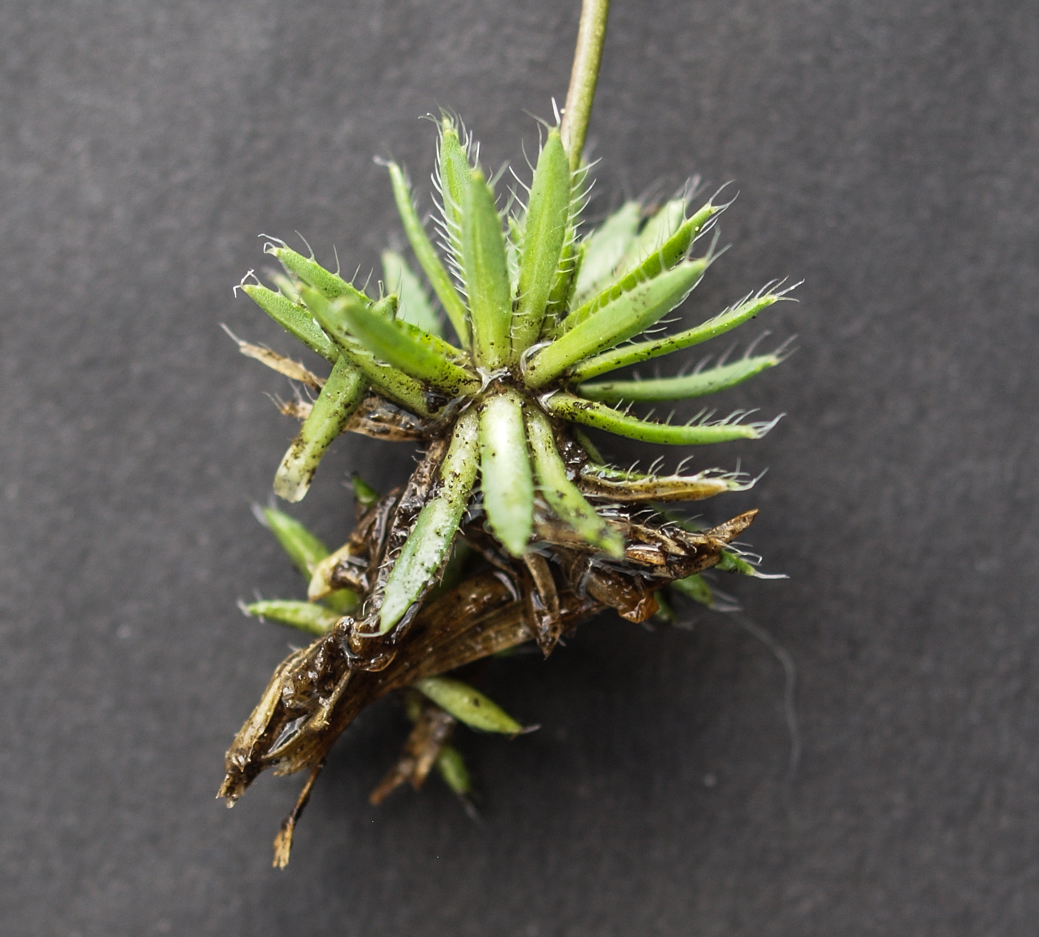 Immergrünes Felsenblümchen (Draba aizoides), Grazer Bergland, Schöckel, 1420 m